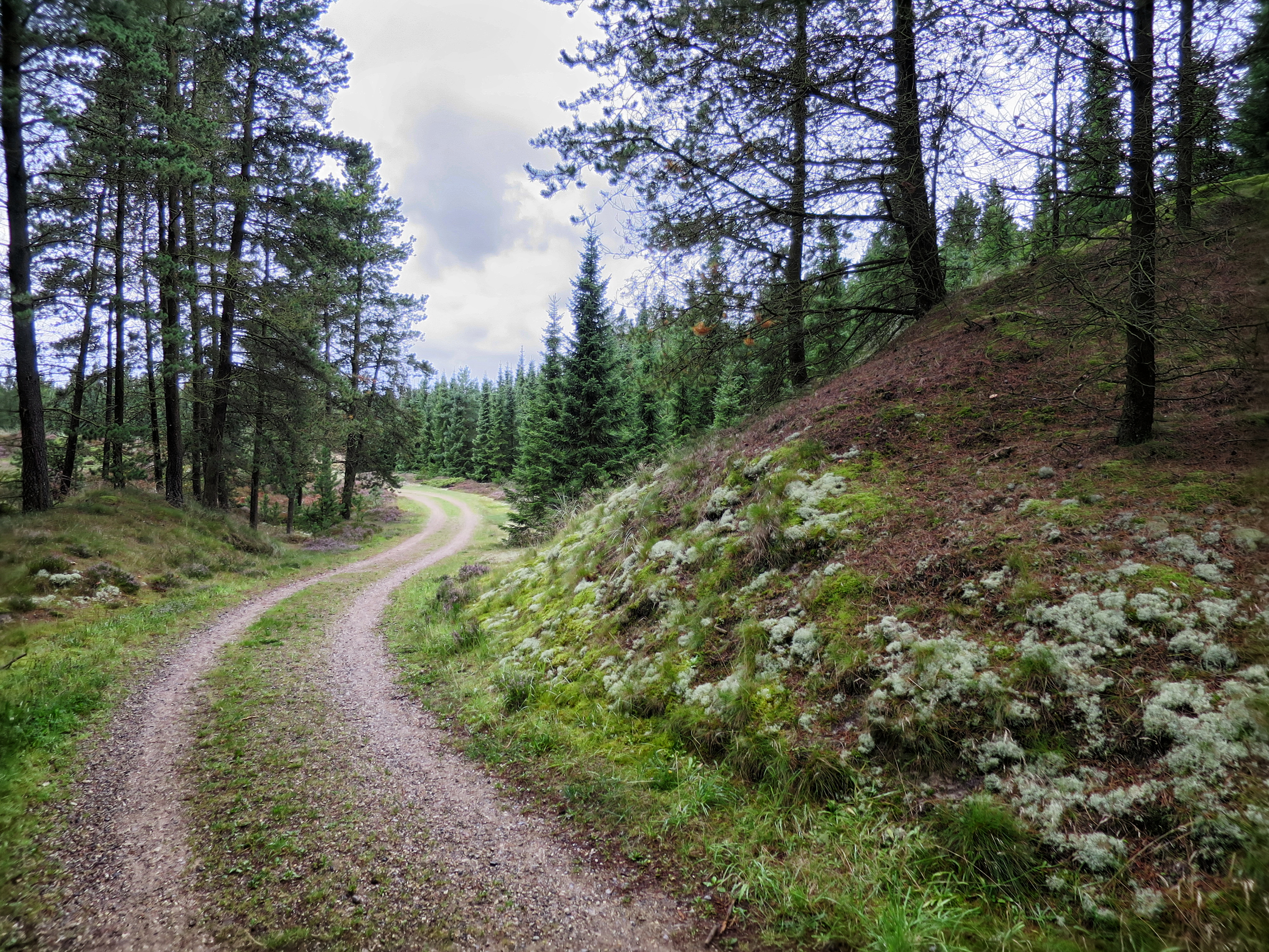 Vestkystruten, national cykelrute nr. 1, ved Jammerbugten.